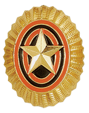 Общевойсковая кокарда Российской Федерации. 1994.